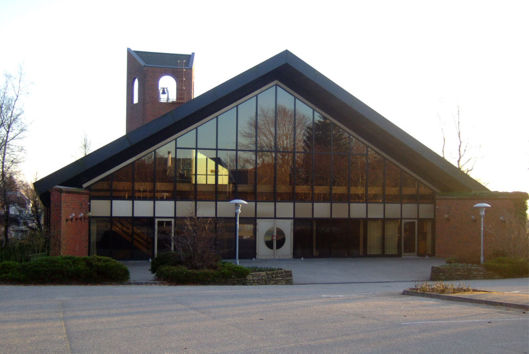 Bryne church, Bryne Norway